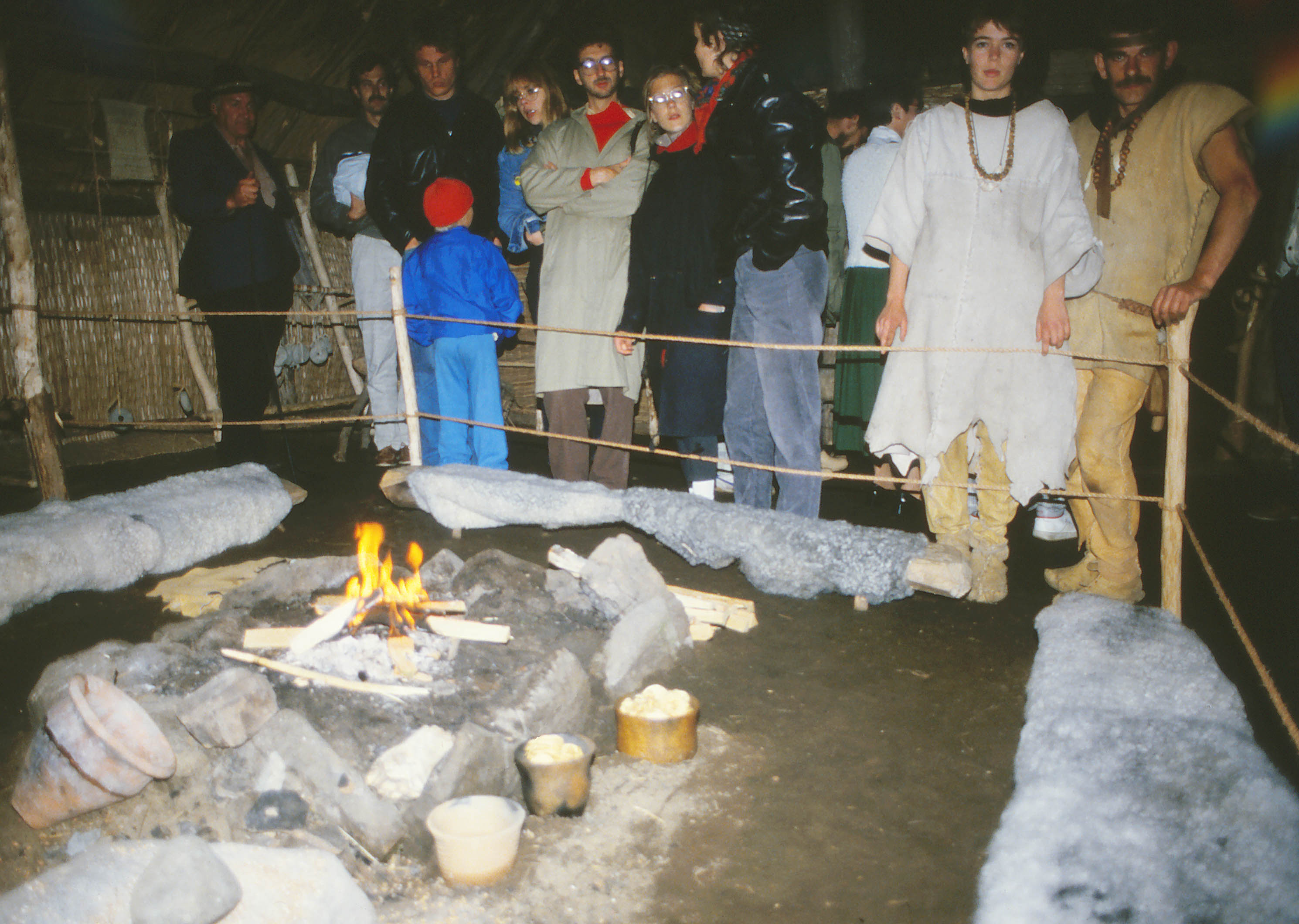 Stenåldersprojektet Forntid i Nutid i Skånes djurpark, Sverige